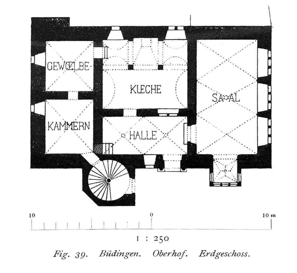 Grundrissskizze des Oberhofs in Büdingen nach Karl Bronner 1890